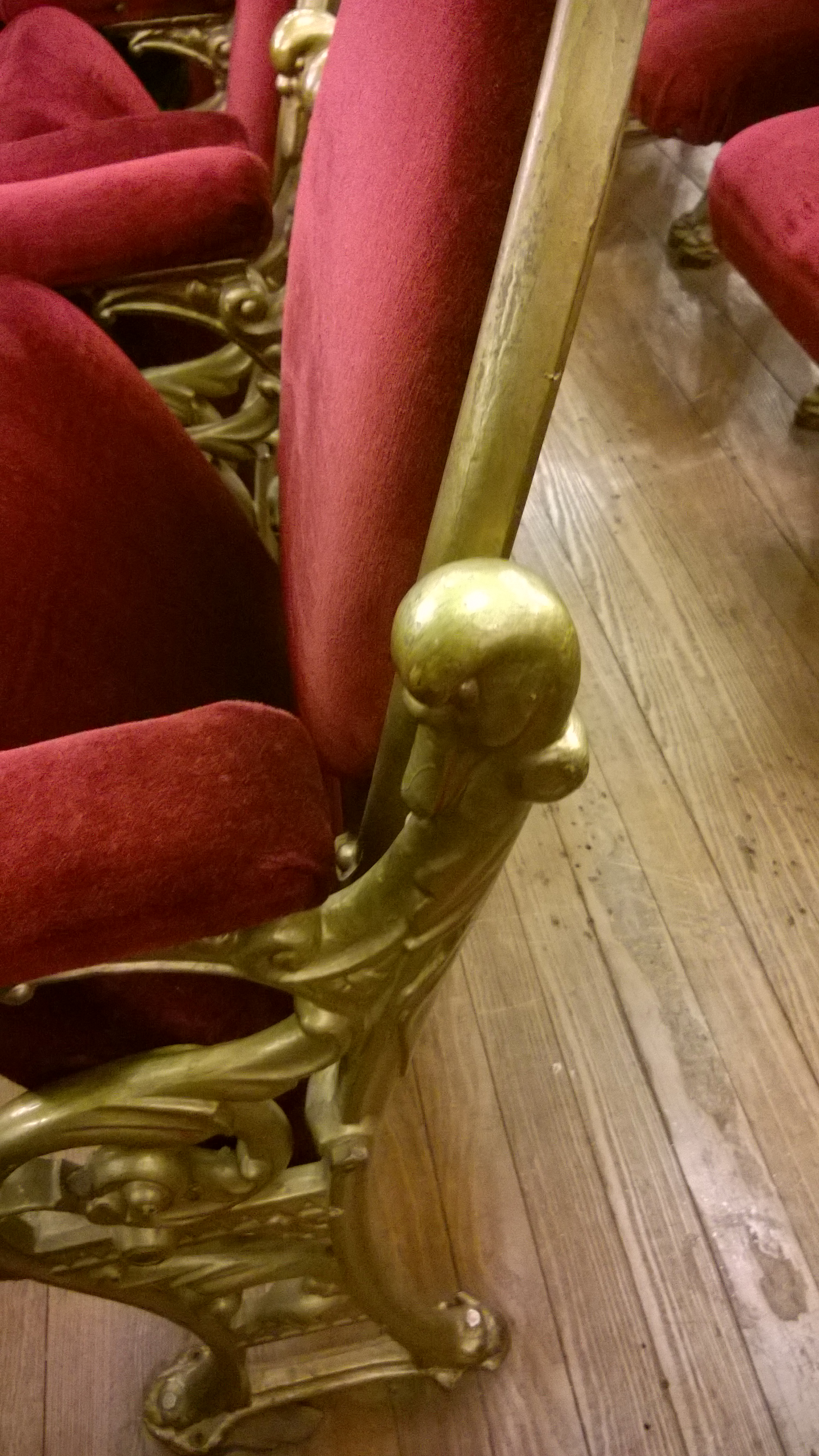 Detalle de la Butaca del Teatro del Libertador General San Martín de Córdoba Argentina.